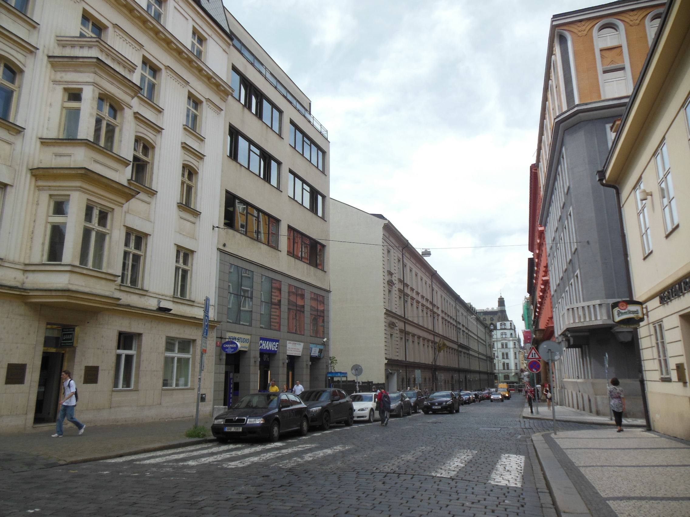 Ulice Politických vězňů na Novém Městě v Praze.